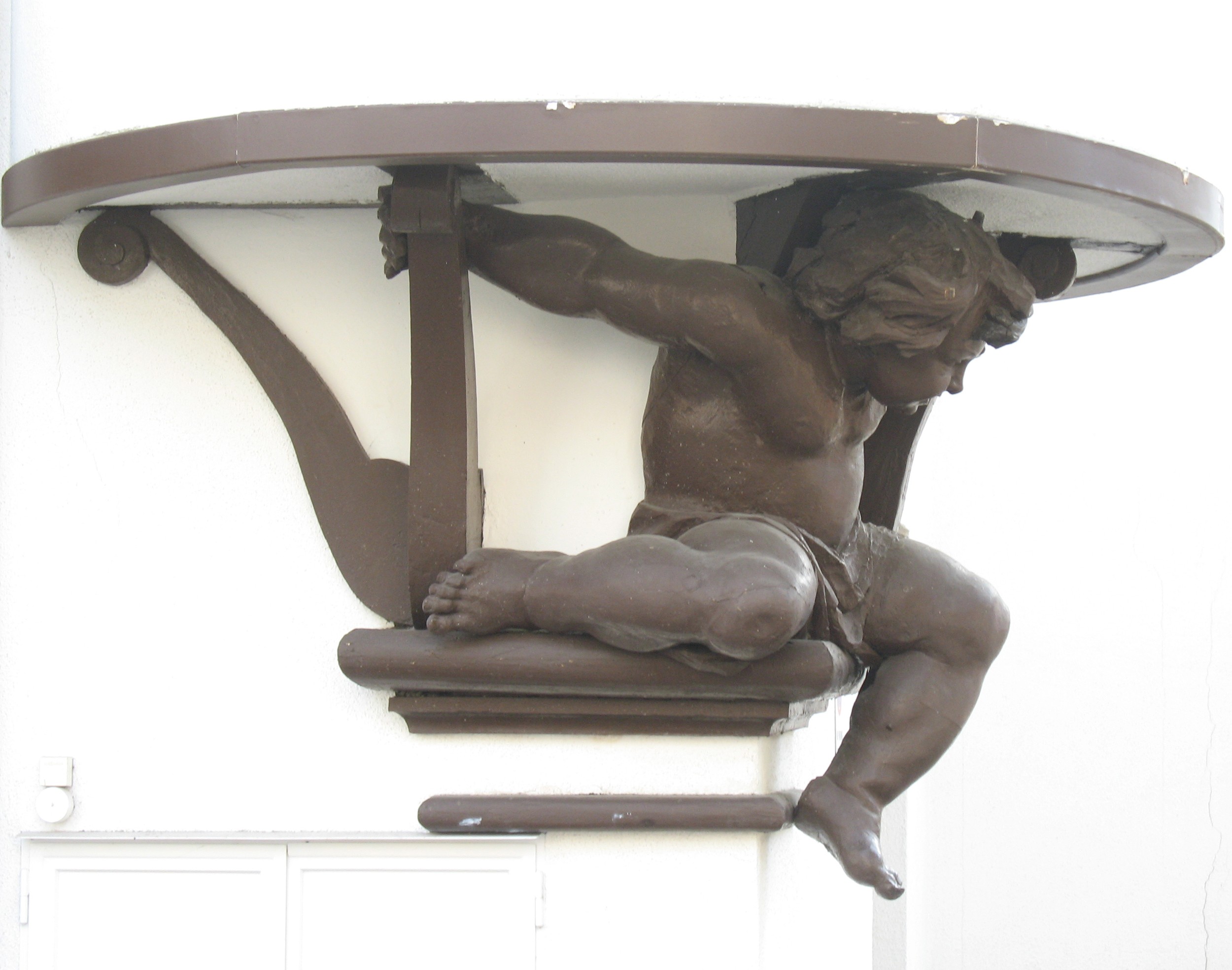 Sculpture in wood by Johann Baptist Moroder-Lusenberg (1870 – 1932) Hotel Madonna in St. Ulrich in Gröden - Ortisei Val Gardena